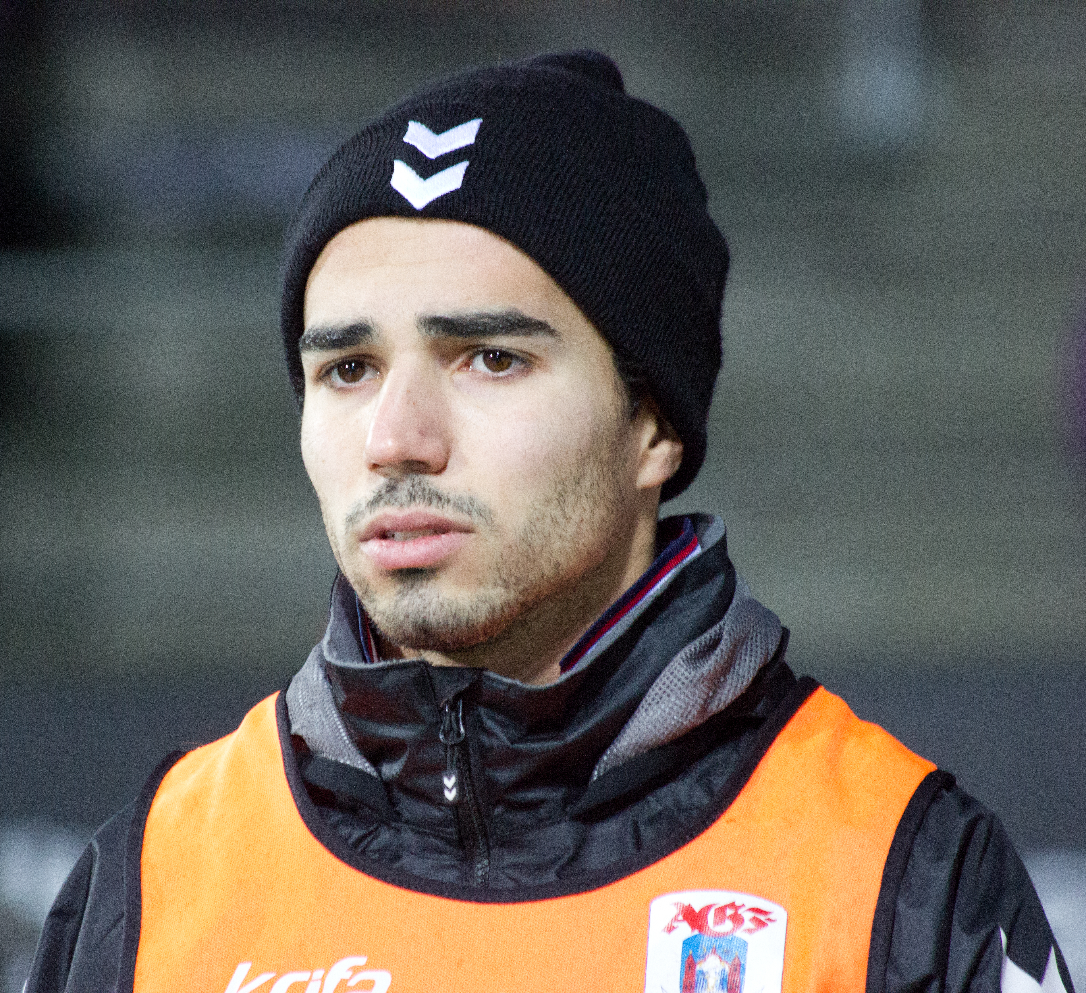 Osama Akharraz under opvarmning